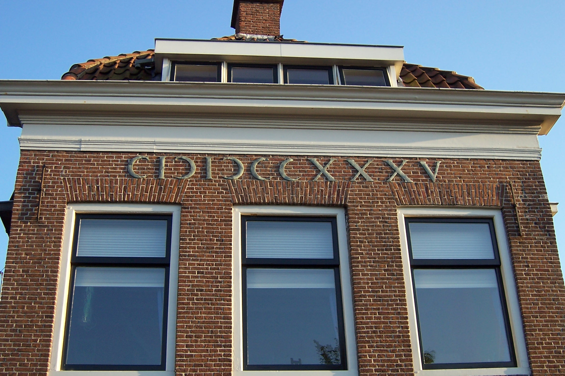 Harlingen: Oud-Romeinse cijfers onder de kroonlijst (lood met bladgoud). Opgenomen in de toeristische wandelroute, mensen puzzelen naar het juiste jaartal.